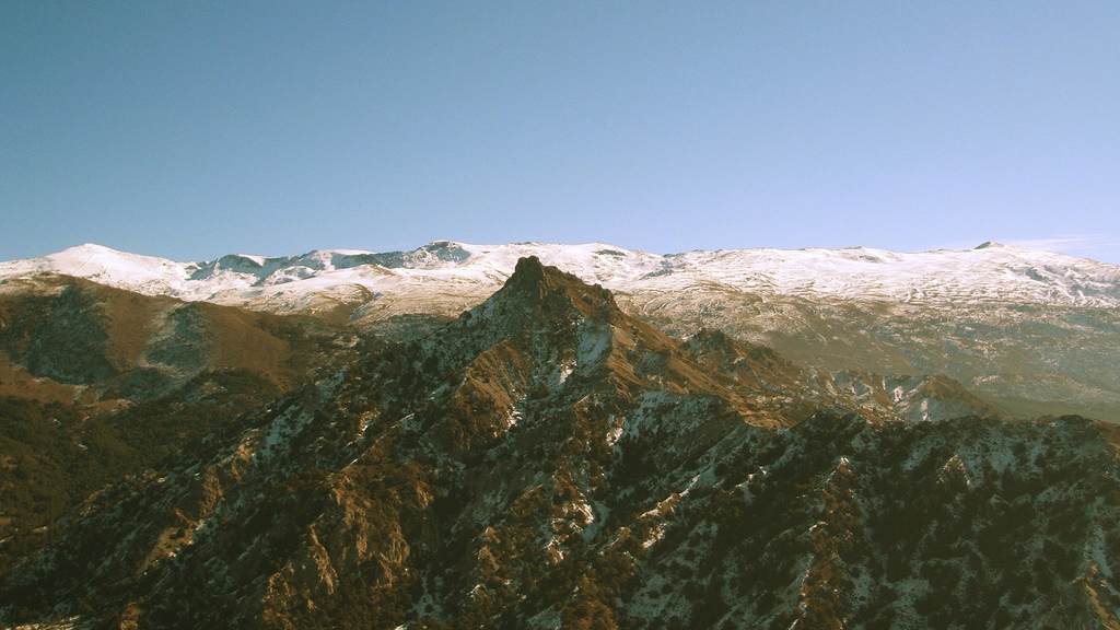 Panorámica de la Sierra Nevada (España)